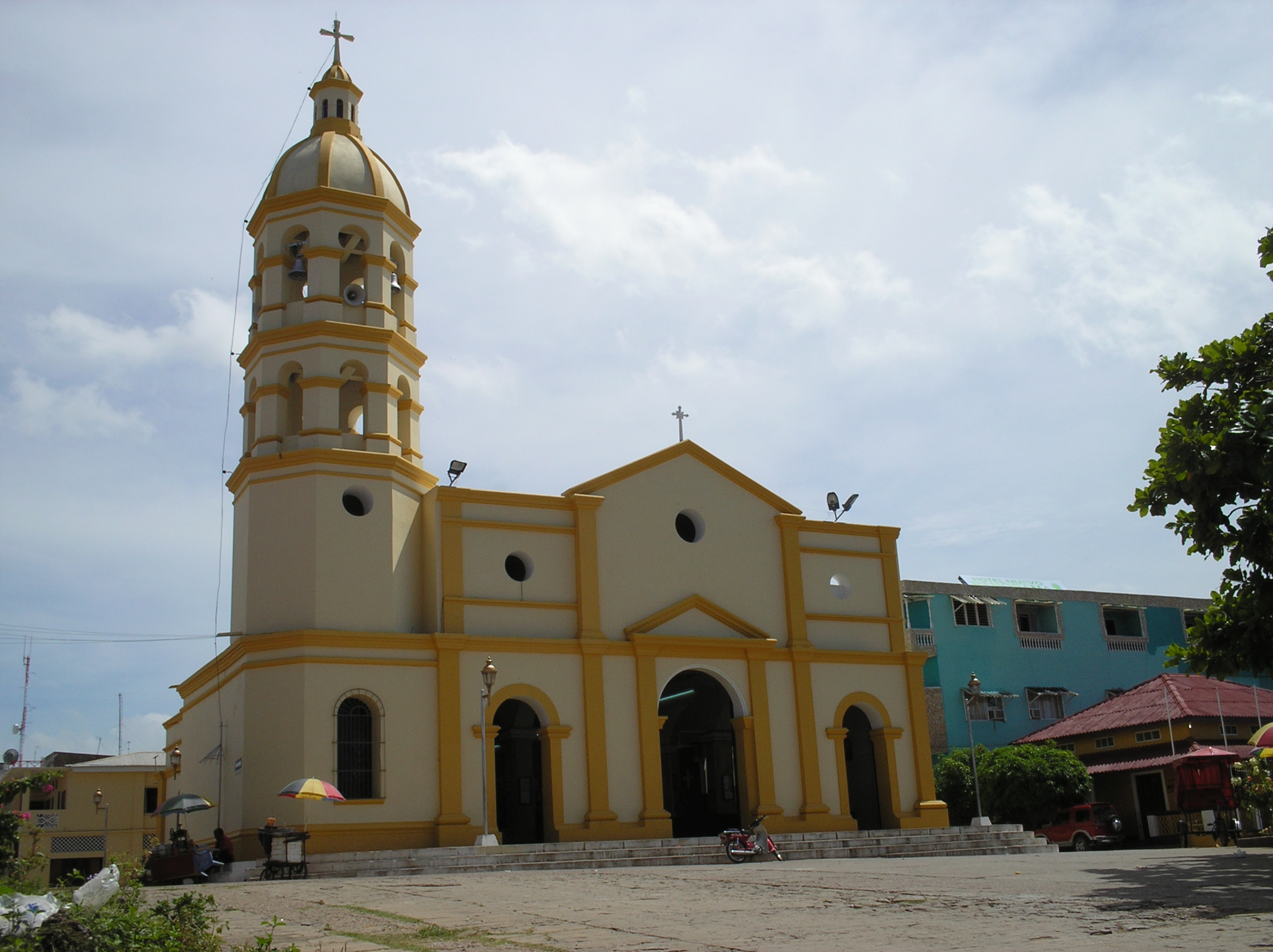 Vista de la fachada de la Catedral Nuestra Señora de la Candelaria, Diocesis de El Banco(Magdalena)